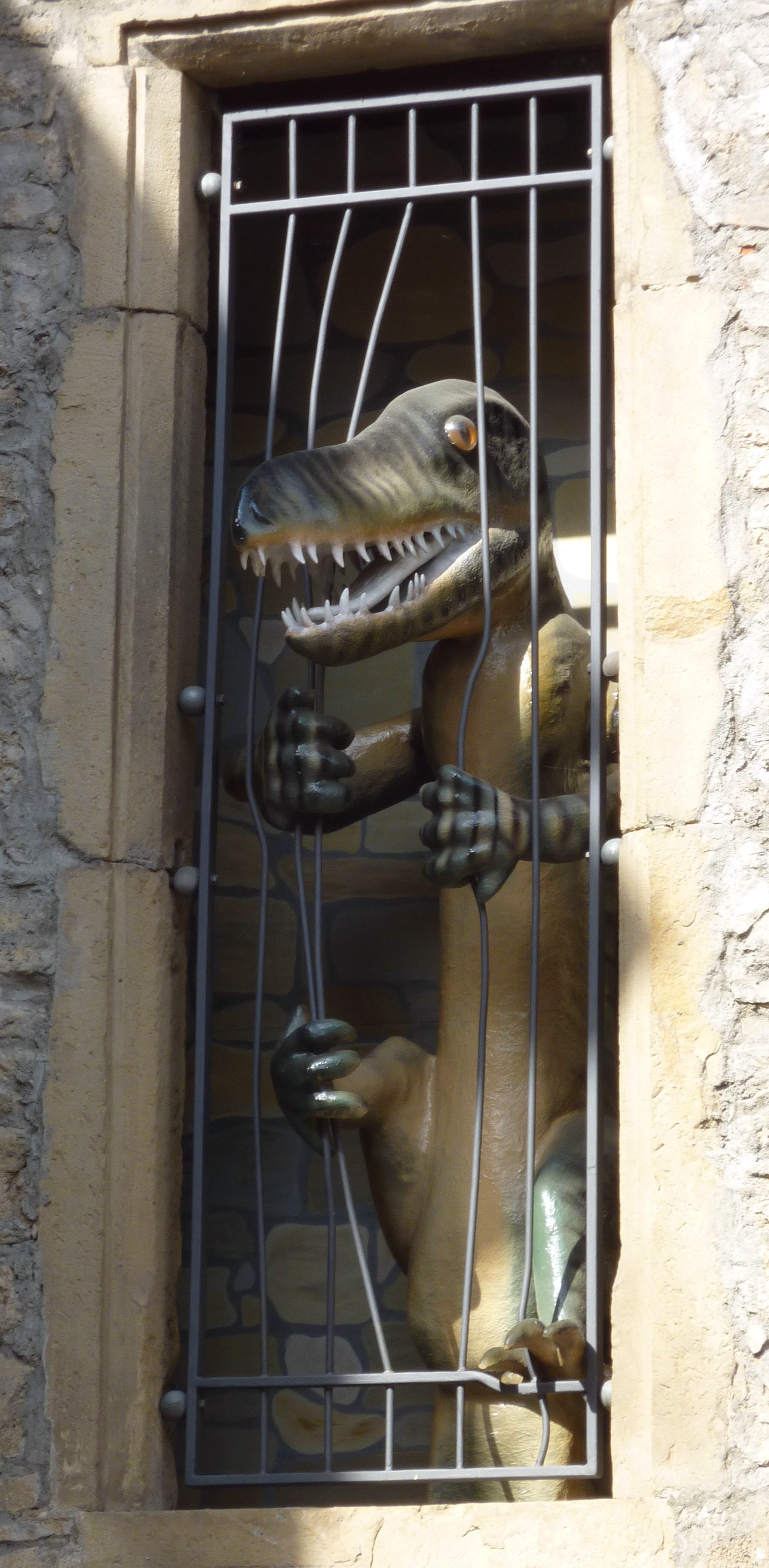 Fassadenschmuck des Muschelkalkmuseums in Ingelfingen